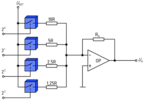 Dëst Bild weist en Digital-Analog-Wandler mat bewerteten Widerstänn